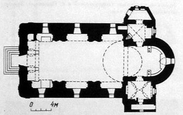 Україна. Костел Відвідання Єлизавети Пресвятою Дівою Марією (Китайгород), Кам'янець-Подільський район. 1772 р.